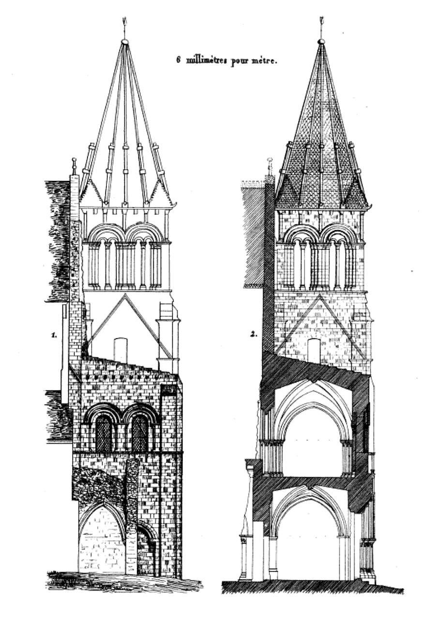 Élévation latérale et coupe de l'avant-nef avec cloche